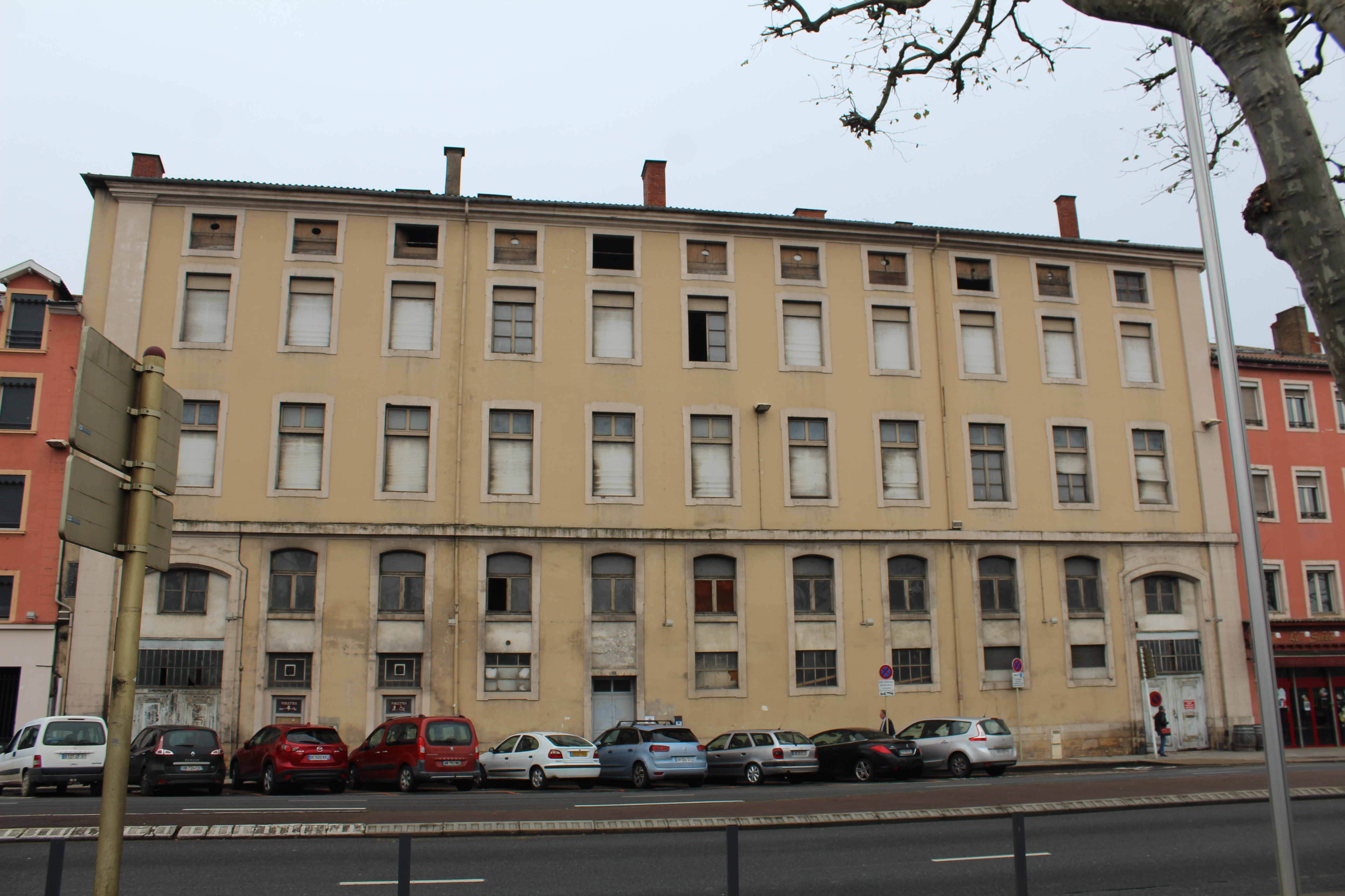 Hospice de la Charité de Mâcon vue depuis le quai Lamartine.